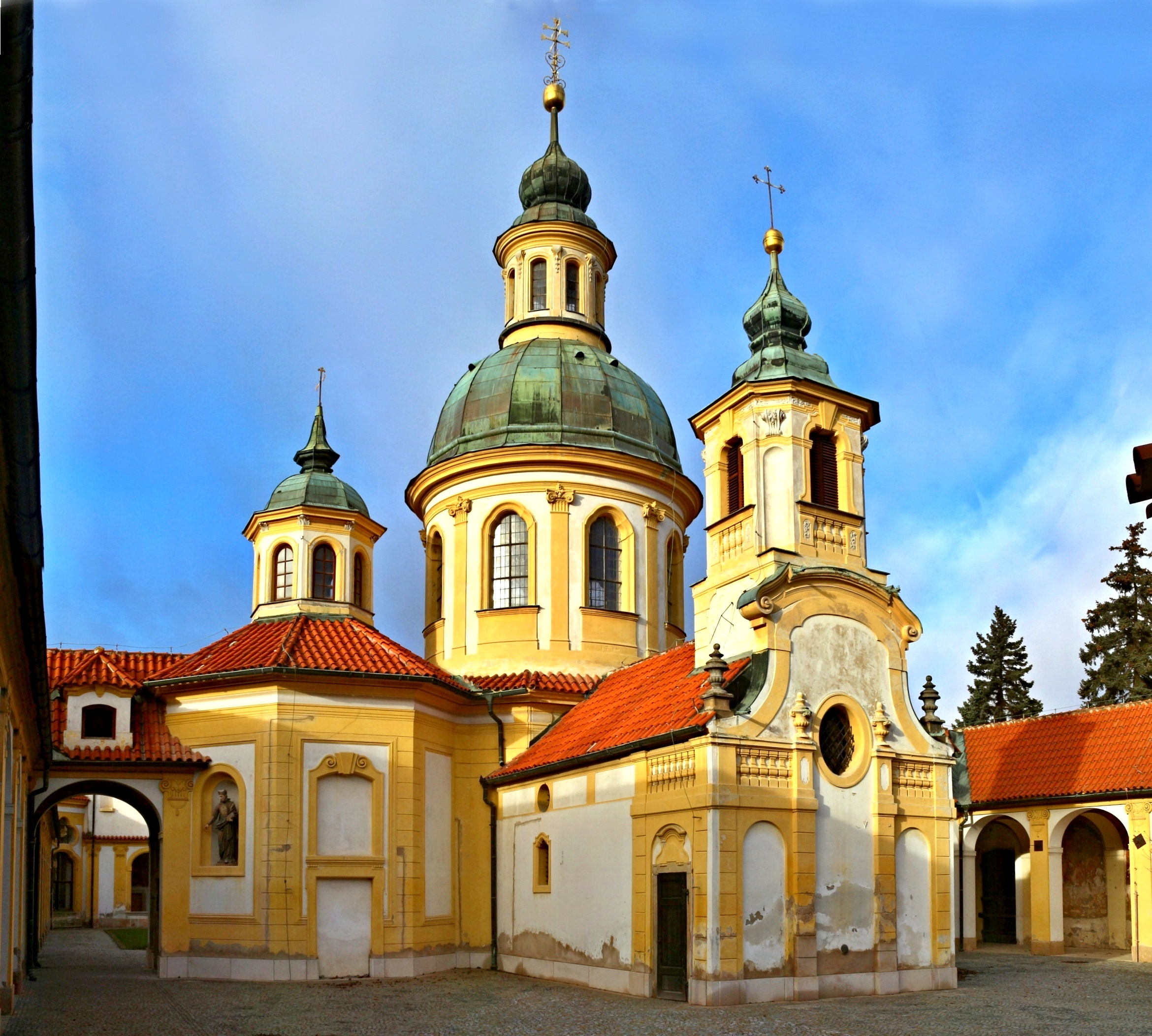 Kostel Panny Marie Vítězné na Bílé Hoře